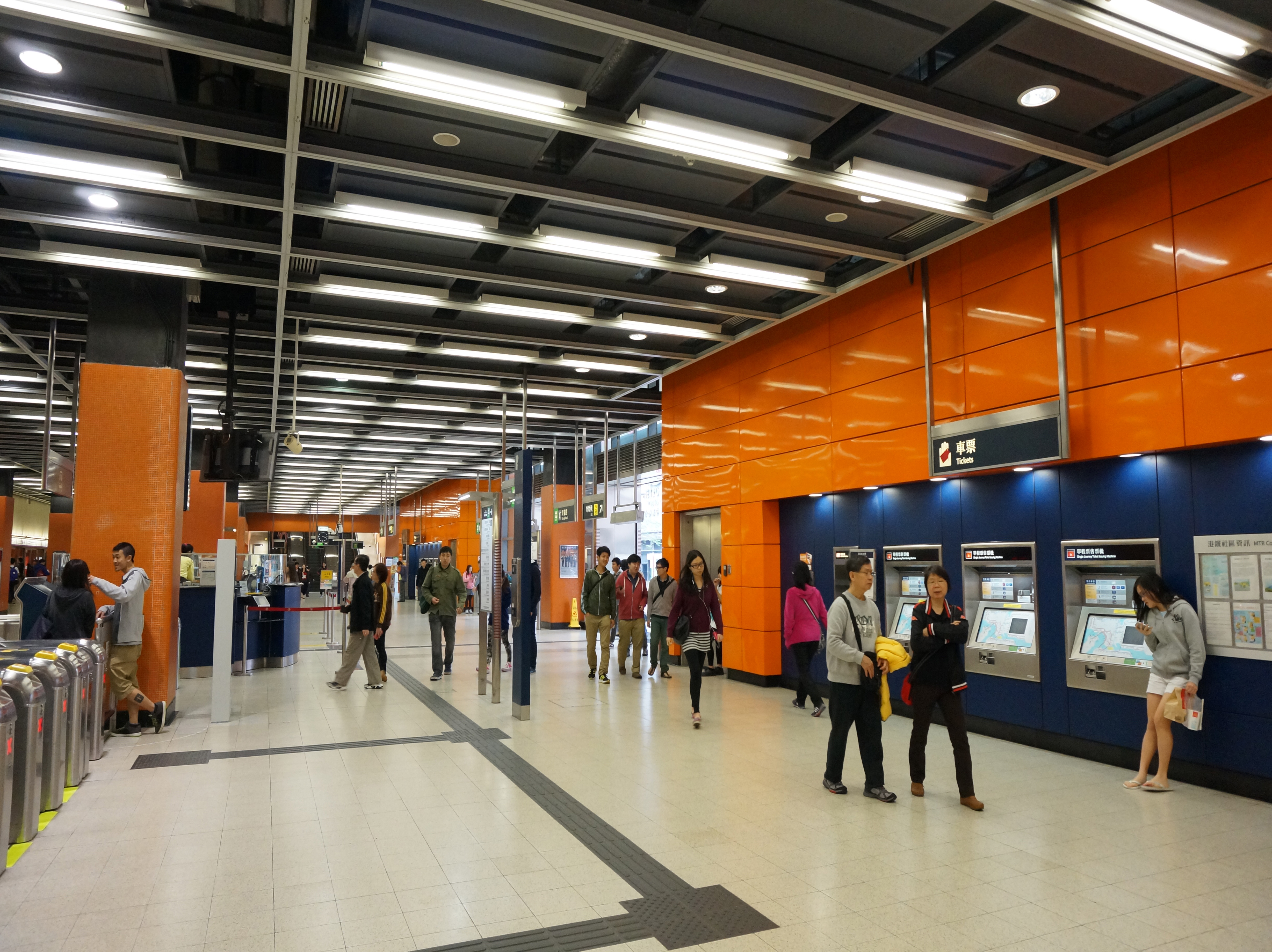 港鐵寶琳站大堂